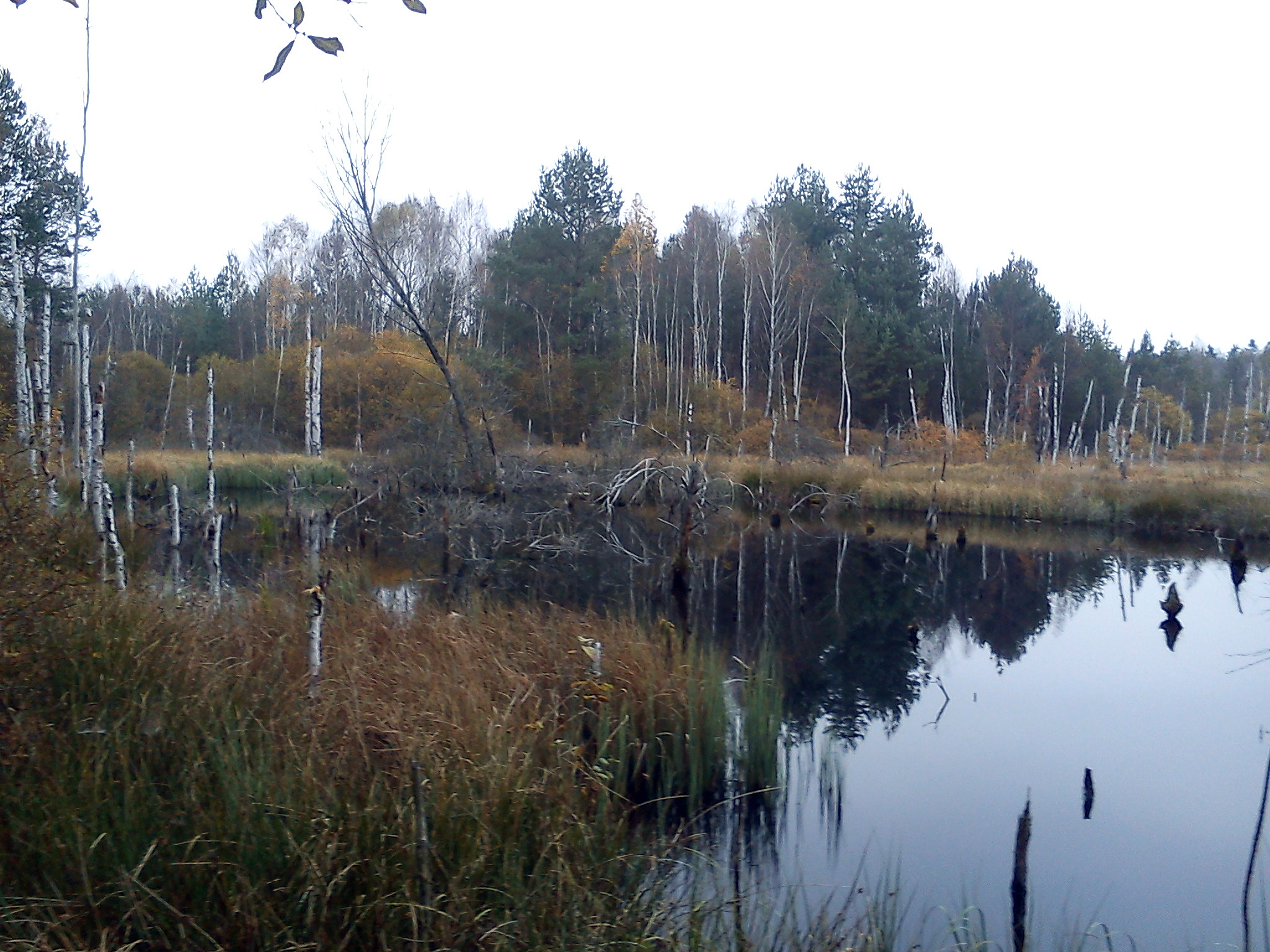 Borkovické blata - pohled rašeliniště